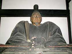 足利義昭 （ashikaga yoshiaki）